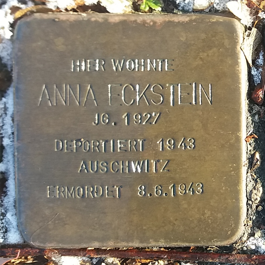 Stolperstein für Anna Eckstein, Mitglied der Großfamilie Eckstein, Vöhringen (Iller)